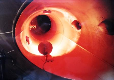 Austrittsscoop